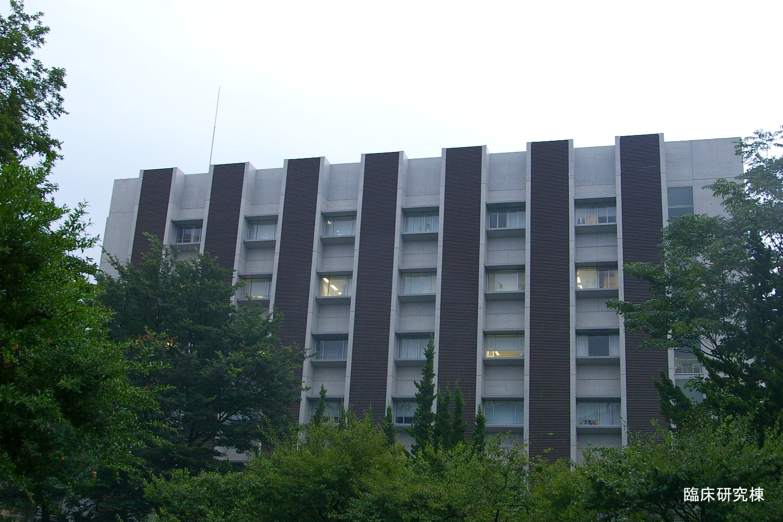 2009.5日本国内で塾生 (talk)が撮影。